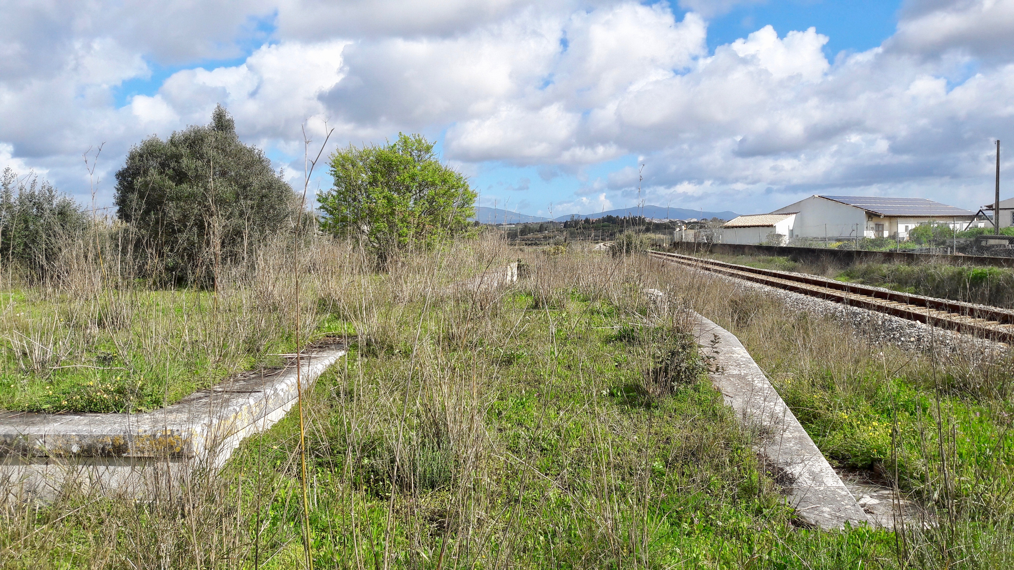 Apeadeiro de Odiáxere - cais de mercadorias. 03/2018.